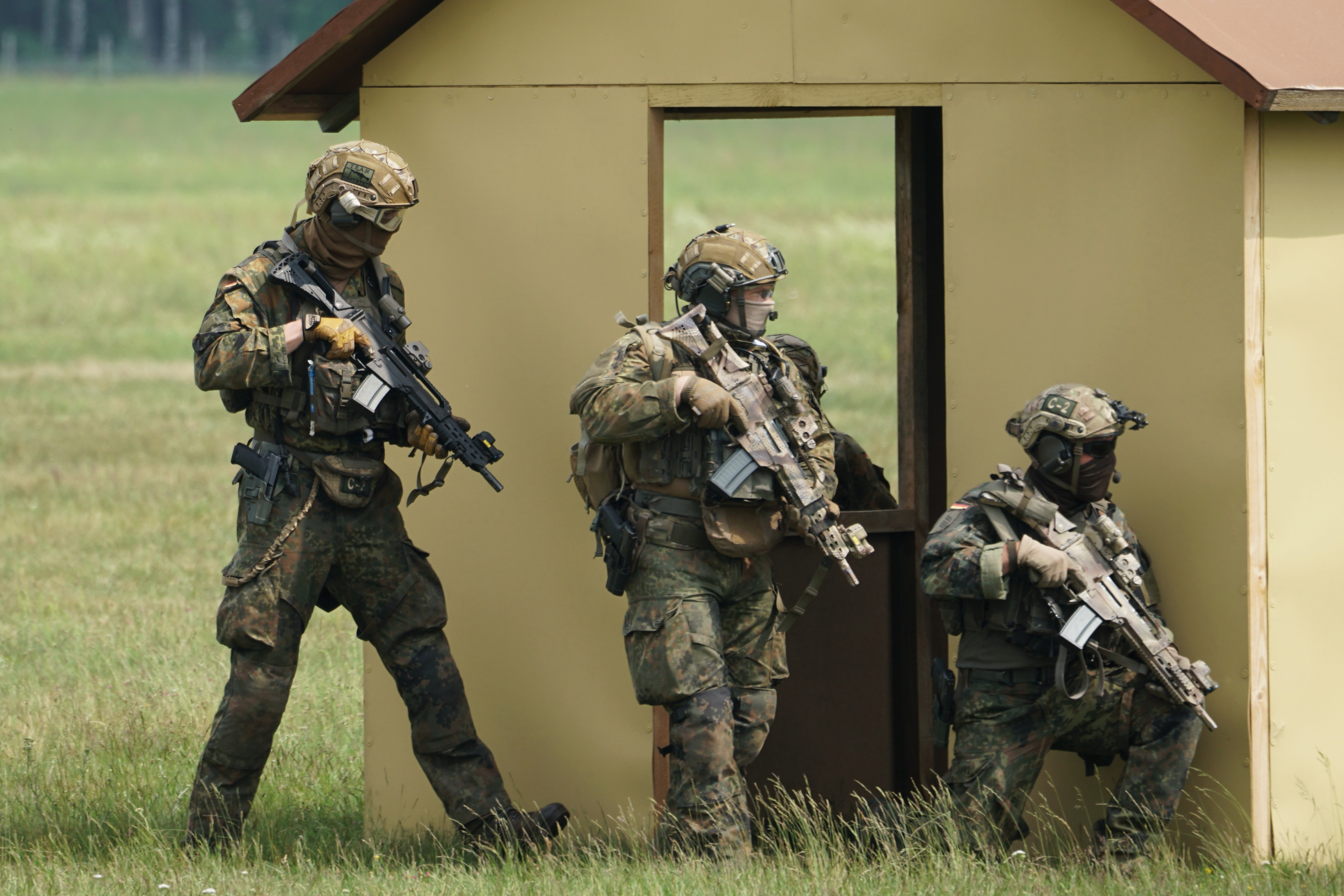 Tag der Bundeswehr 2019 auf dem Heeresflugplatz Faßberg